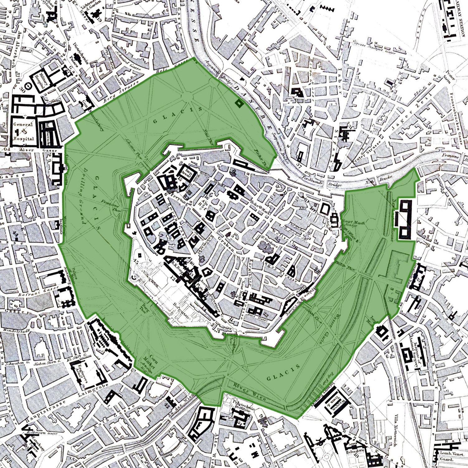 Wiener Glacis 1858, Basiskarte von John Murray London, genordet, Grafik von user:Gugerell